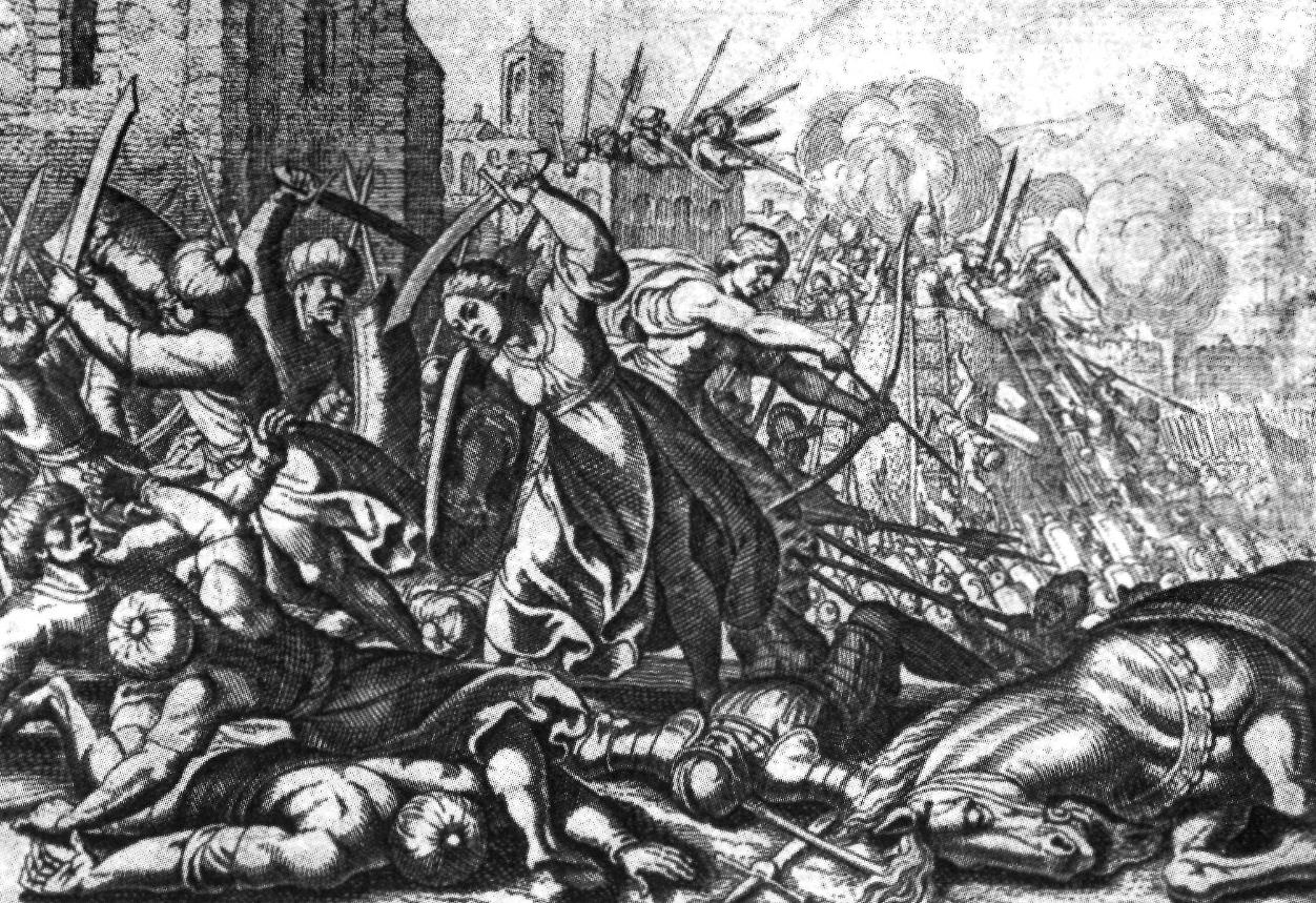 Egri nők Hungarisch-Türkische Chronik1684